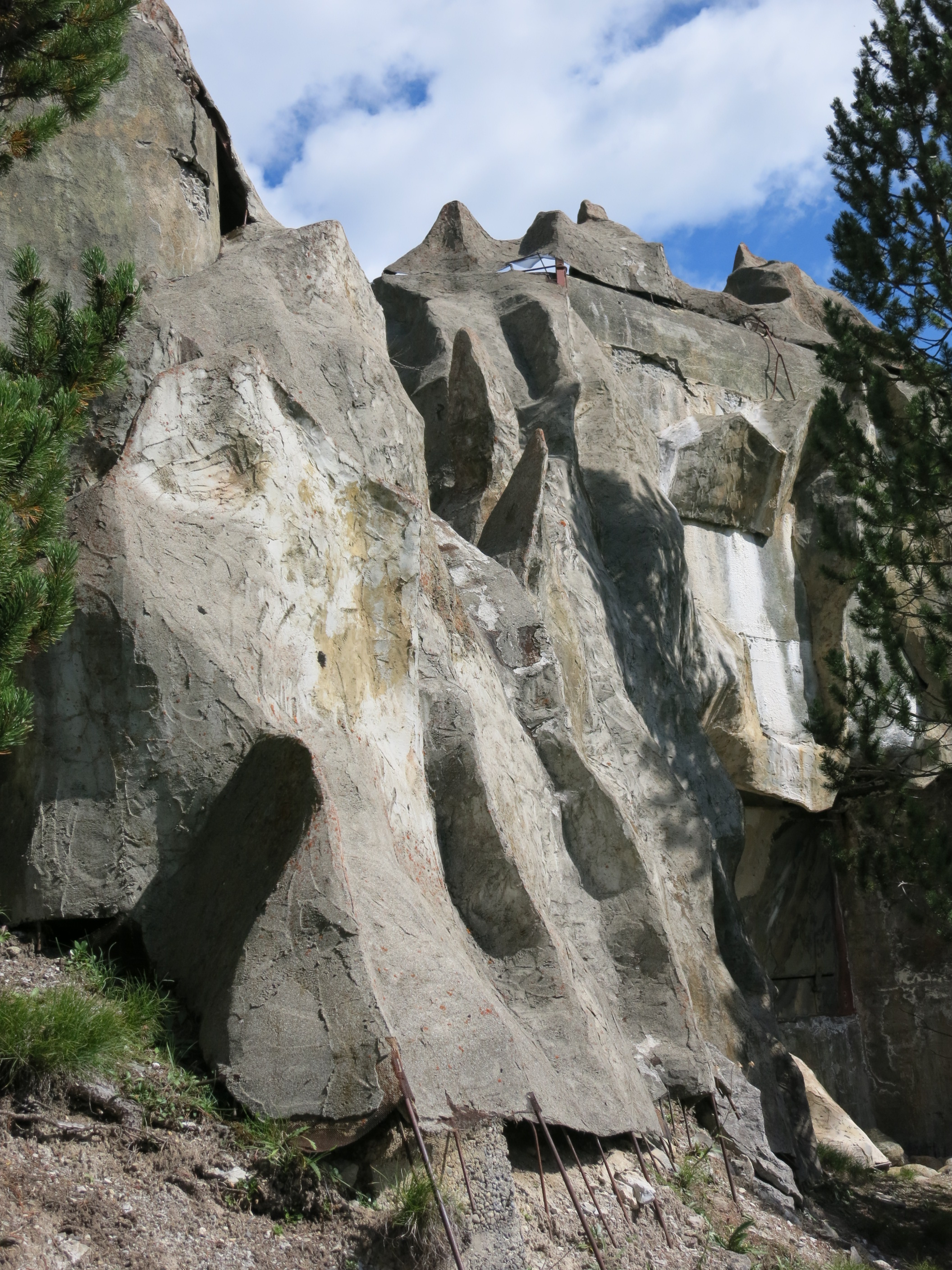 Sperrstelle Ova Spin GR, Schweiz